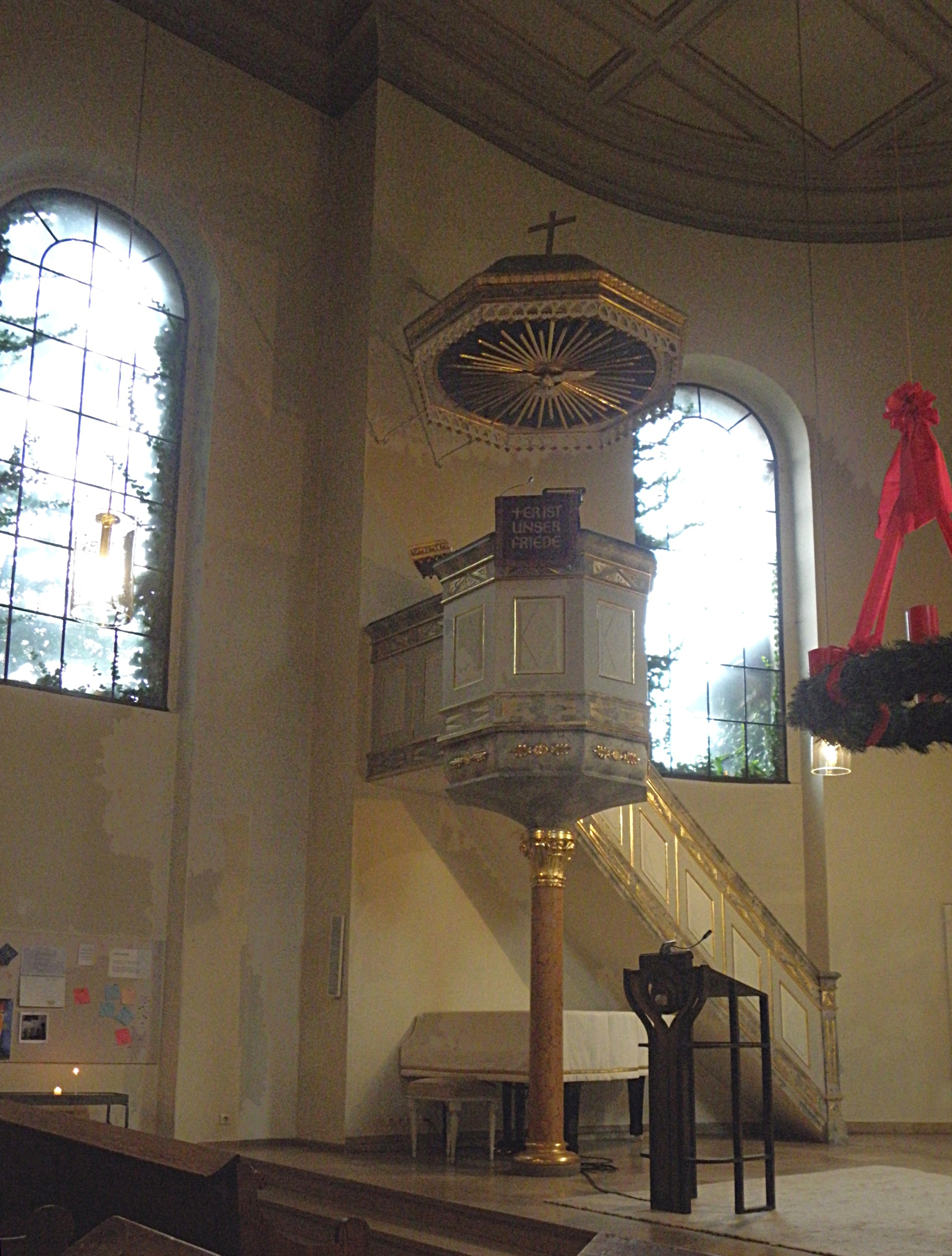 Fürth, Auferstehungskirche